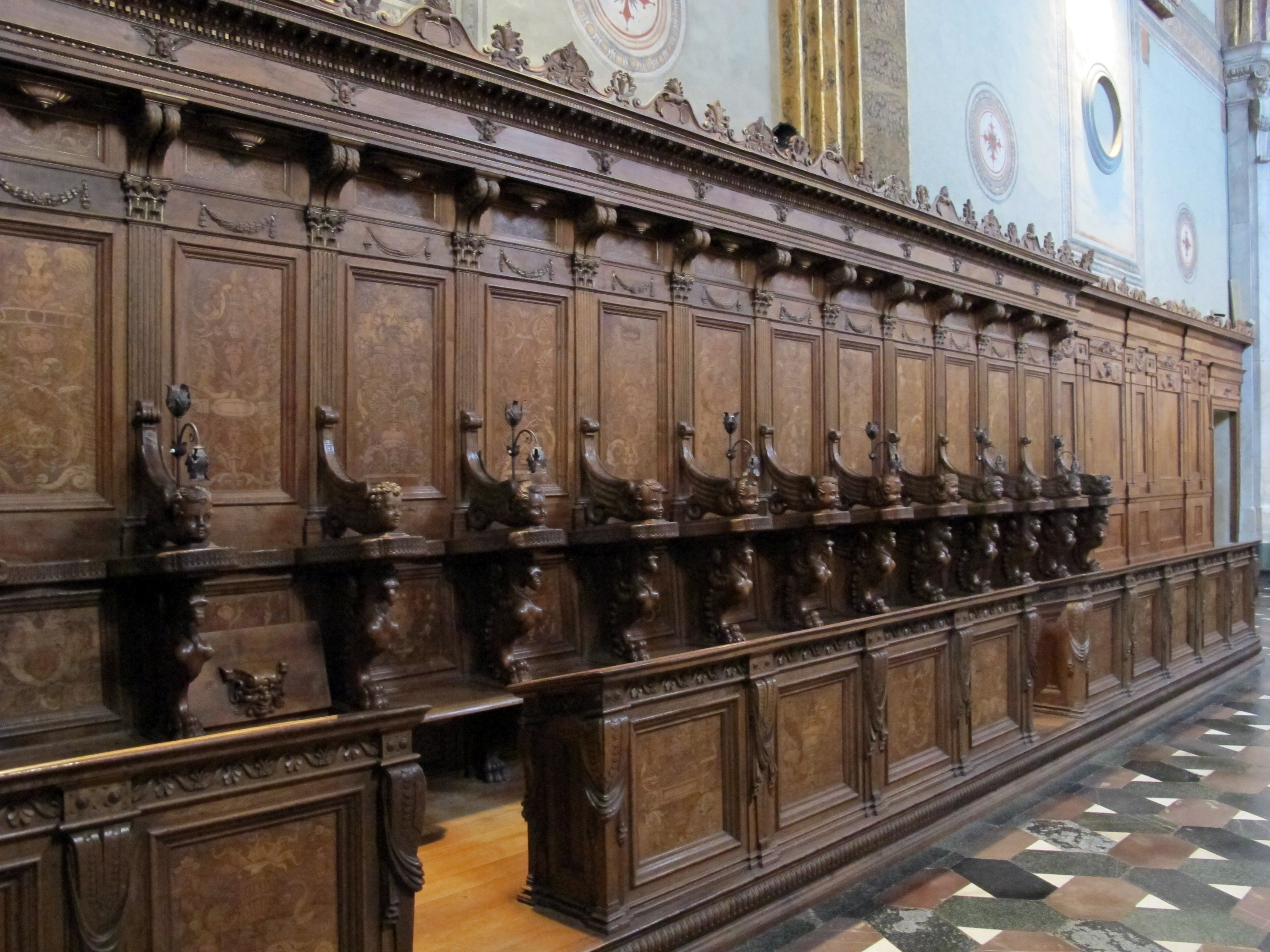 Certosa di fi, chiesa di s. lorenzo, interno, coro